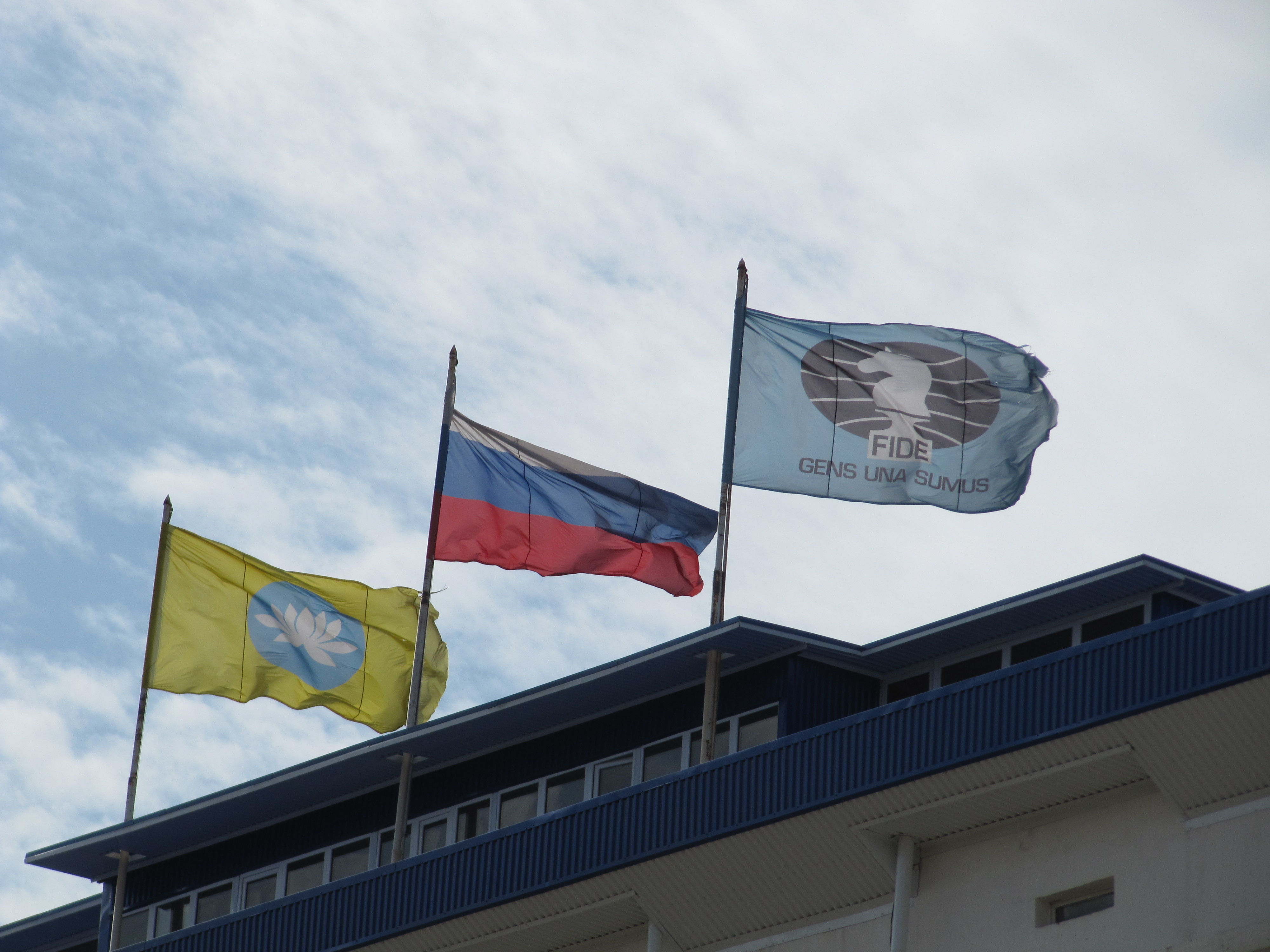 Три флага на здании мэрии Элисты